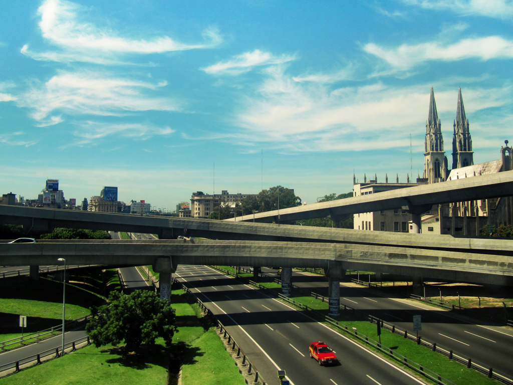 Intercambiador de la autopista 25 de Mayo sobre la Presidente Arturo Frondizi (denominada anteriormente 9 de Julio Sur) en el barrio de Constitución, ciudad de Buenos Aires, Argentina.